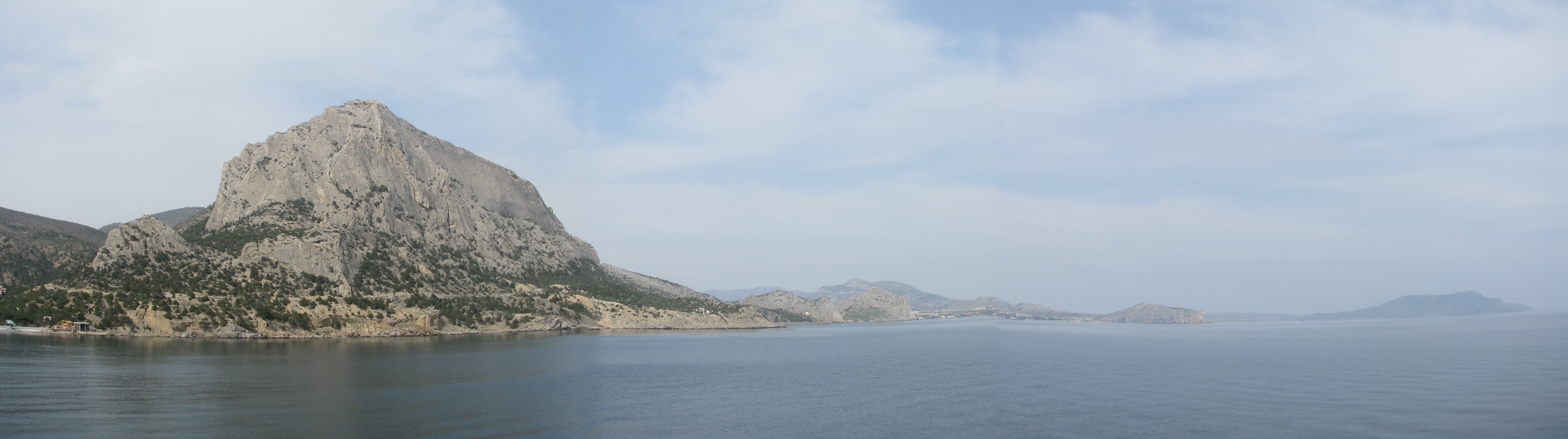 Панорама горы Сокол, Крым